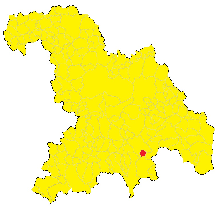 Mappa del comune di Carrosio (AL)